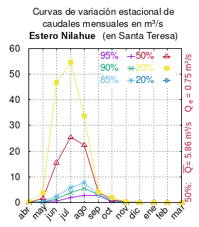 Curvas de variación estacional del estero Nilahue en Santa Teresa. #GOBIERNO DE CHILE, COMISIÓN NACIONAL DE RIEGO, DIAGNOSTICO ACTUAL DEL RIEGO Y DRENAJE EN CHILE Y SU PROYECCION DIAGNOSTICO DEL RIEGO Y DRENAJE EN LA VI REGIÓN, FEBRERO - 2003 # url : # ANEXO 1 Estación 60, págs. 97, 98, 99 mes 95% 90% 85% 50% 20% abr 0.010 0.010 0.020 0.080 0.200 may 0.210 0.340 0.470 1.620 3.920 jun 0.580 1.390 2.370 15.450 46.610 jul 1.830 3.790 5.880 25.300 54.670 ago 2.880 5.430 7.810 22.440 33.630 sep 2.820 3.010 3.150 3.740 4.260 oct 0.370 0.490 0.590 1.220 2.070 nov 0.100 0.130 0.160 0.270 0.370 dic 0.030 0.050 0.060 0.100 0.100 ene 0.010 0.010 0.020 0.050 0.070 feb 0.000 0.000 0.010 0.020 0.040 mar 0.000 0.010 0.010 0.040 0.090